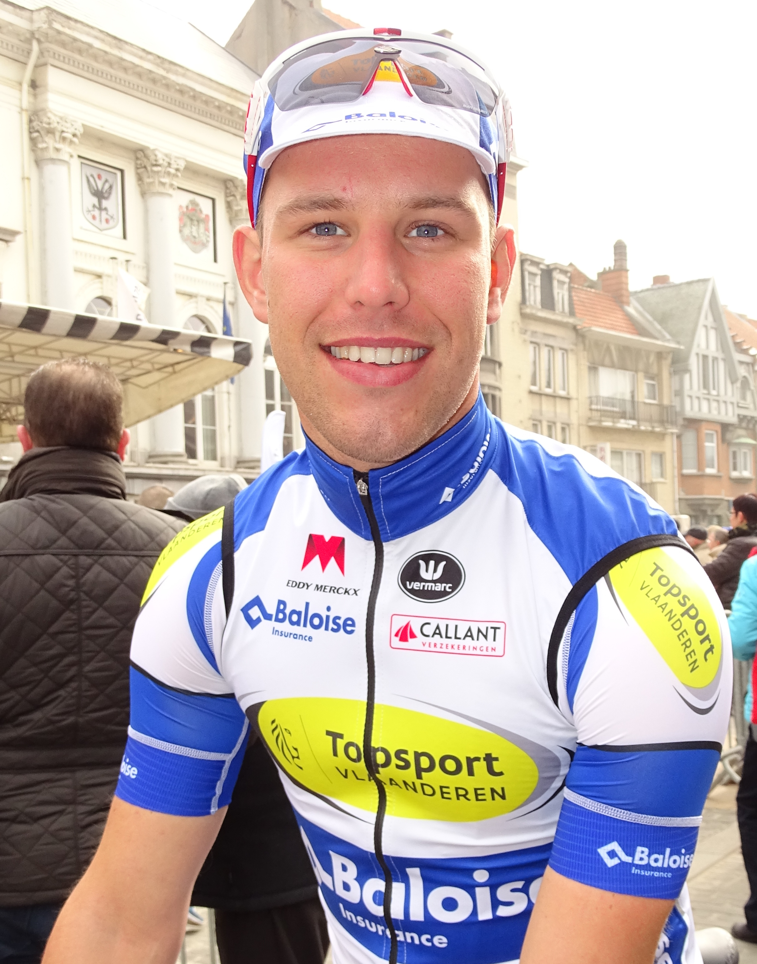 Reportage réalisé le mercredi 18 mars à l'occasion du départ de la Nokere Koerse 2015 à Deinze, Belgique.